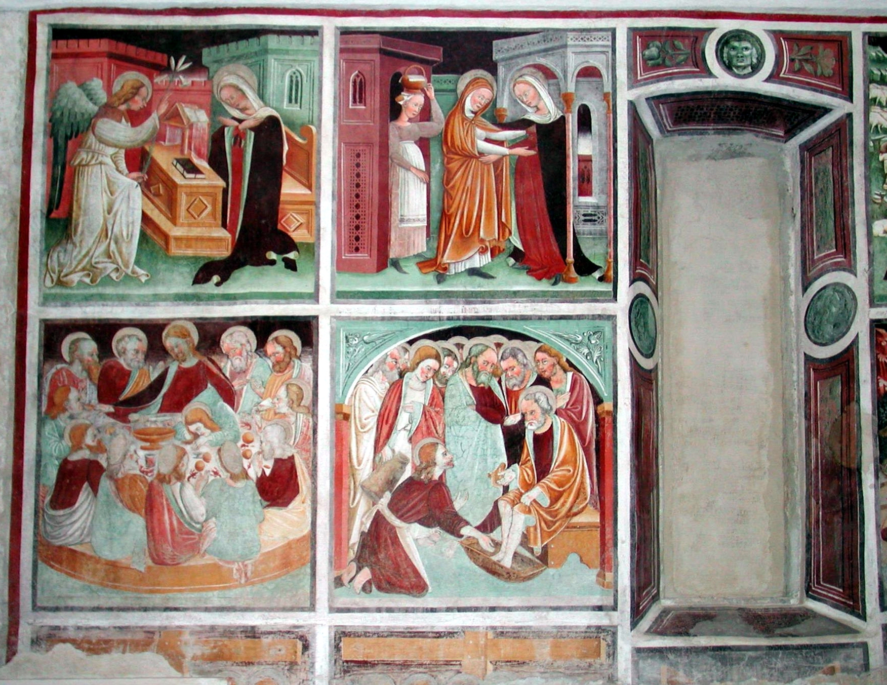 Clusone, Italy, oratorio disciplini, interno, vita di Gesù